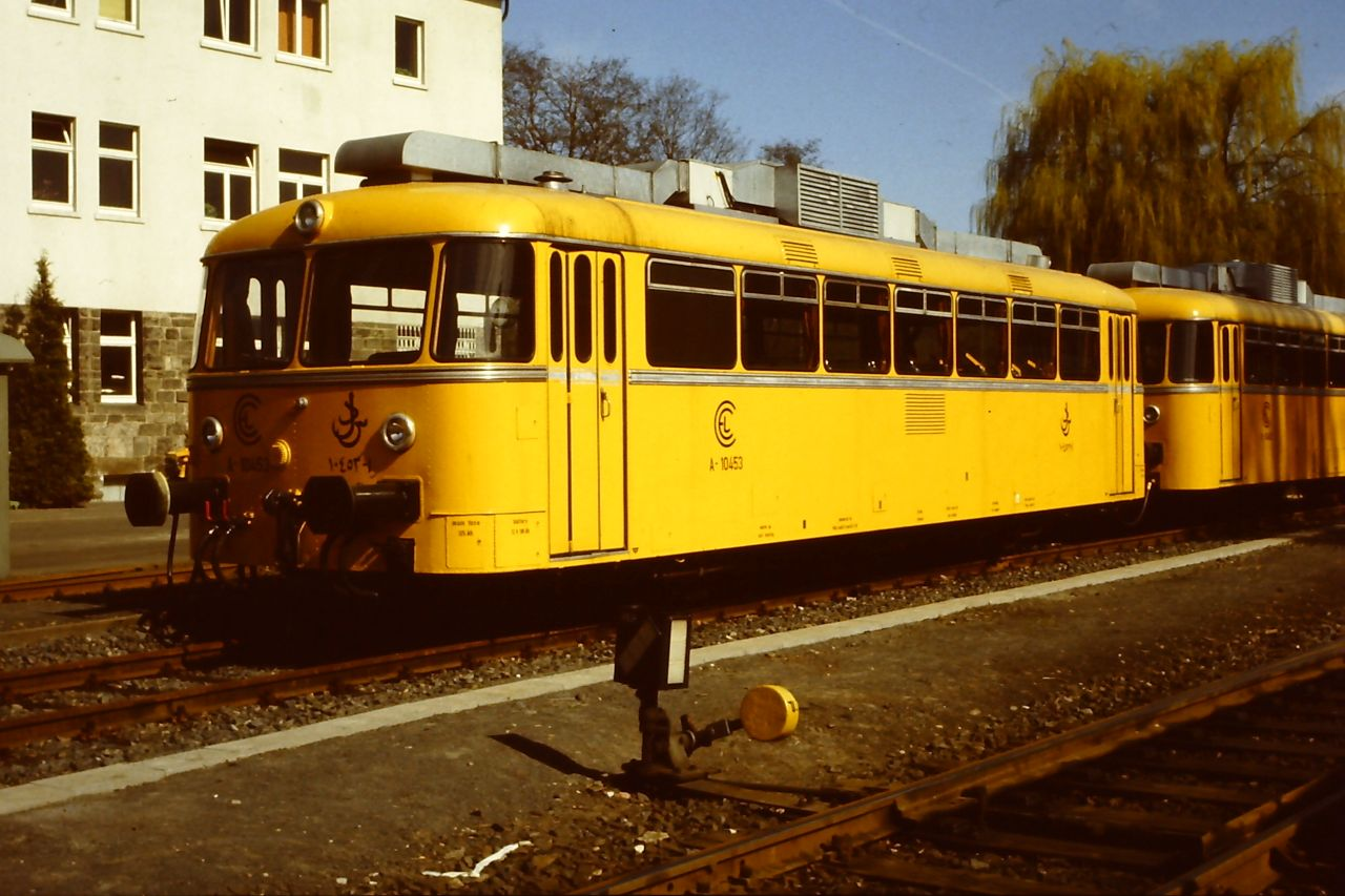 Uerdinger Schienenbus, Baureihe VT 98, verkauft an die Libanesische Staatsbahn, im AW Kassel